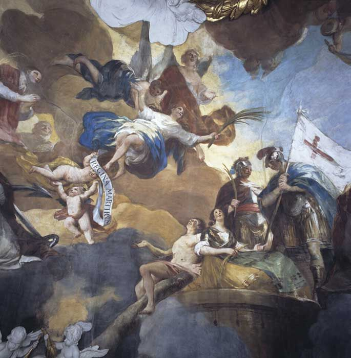 Detalle de la cúpula Regina Martyum en El Pilar, Goya.